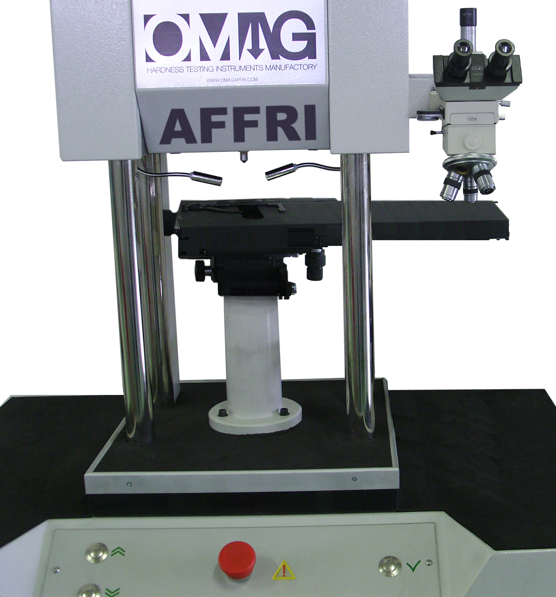 Il piano di lavoro della Macchina SRHU09 della Ditta OmagAffri per le prove di Indentazione Strumentata